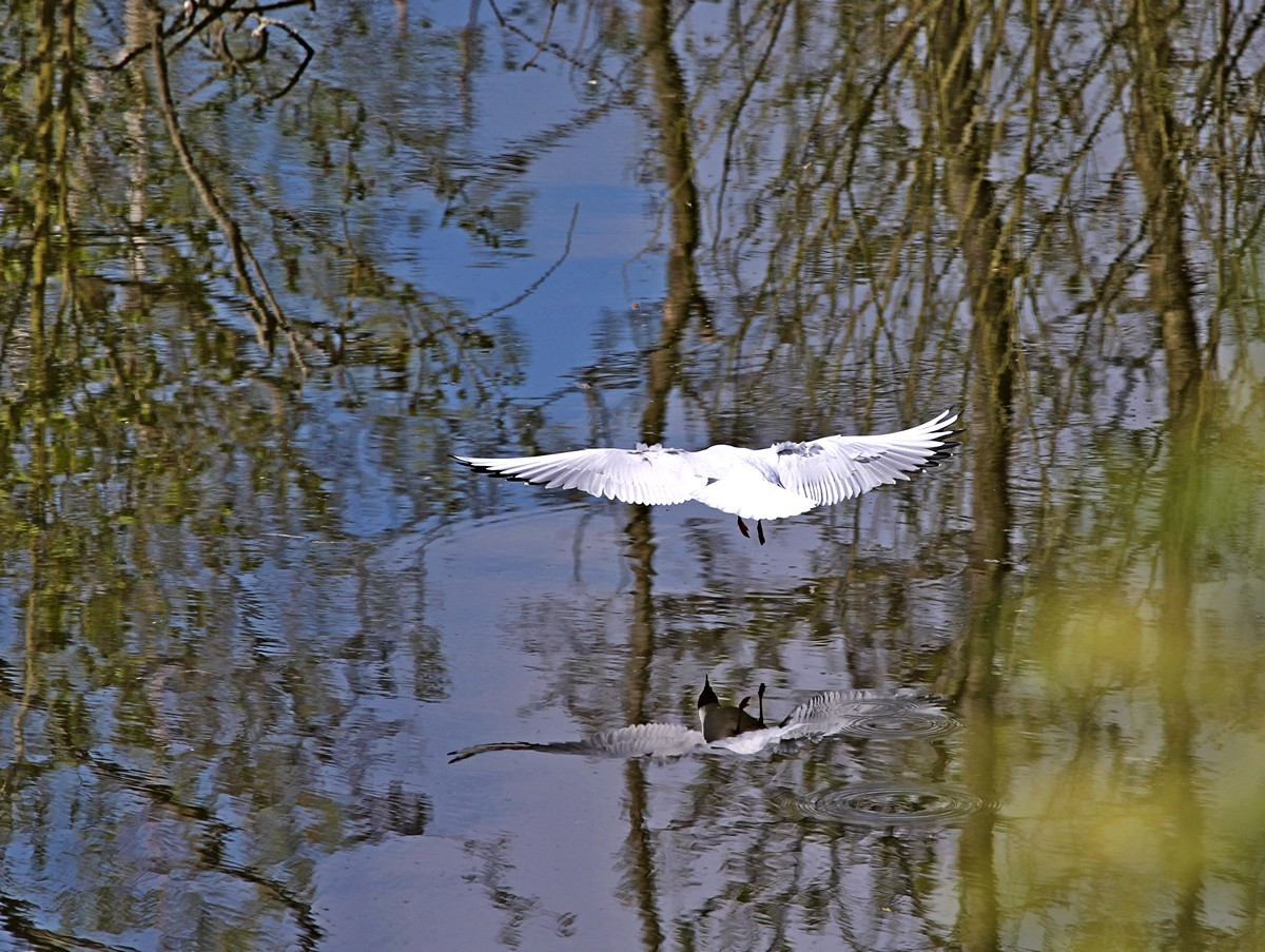 Anfliegende Lachmöwe von oben